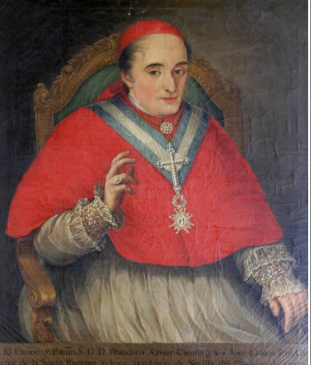 El retratado, que fue arzobispo de Sevilla, cardenal, y rector de la Universidad de Sevilla, (España), aparece retratado con indumentaria eclesiástica y sentado en actitud de bendecir con su mano derecha. Y viste una muceta roja sobre una alba blanca y lleva varias medallas.